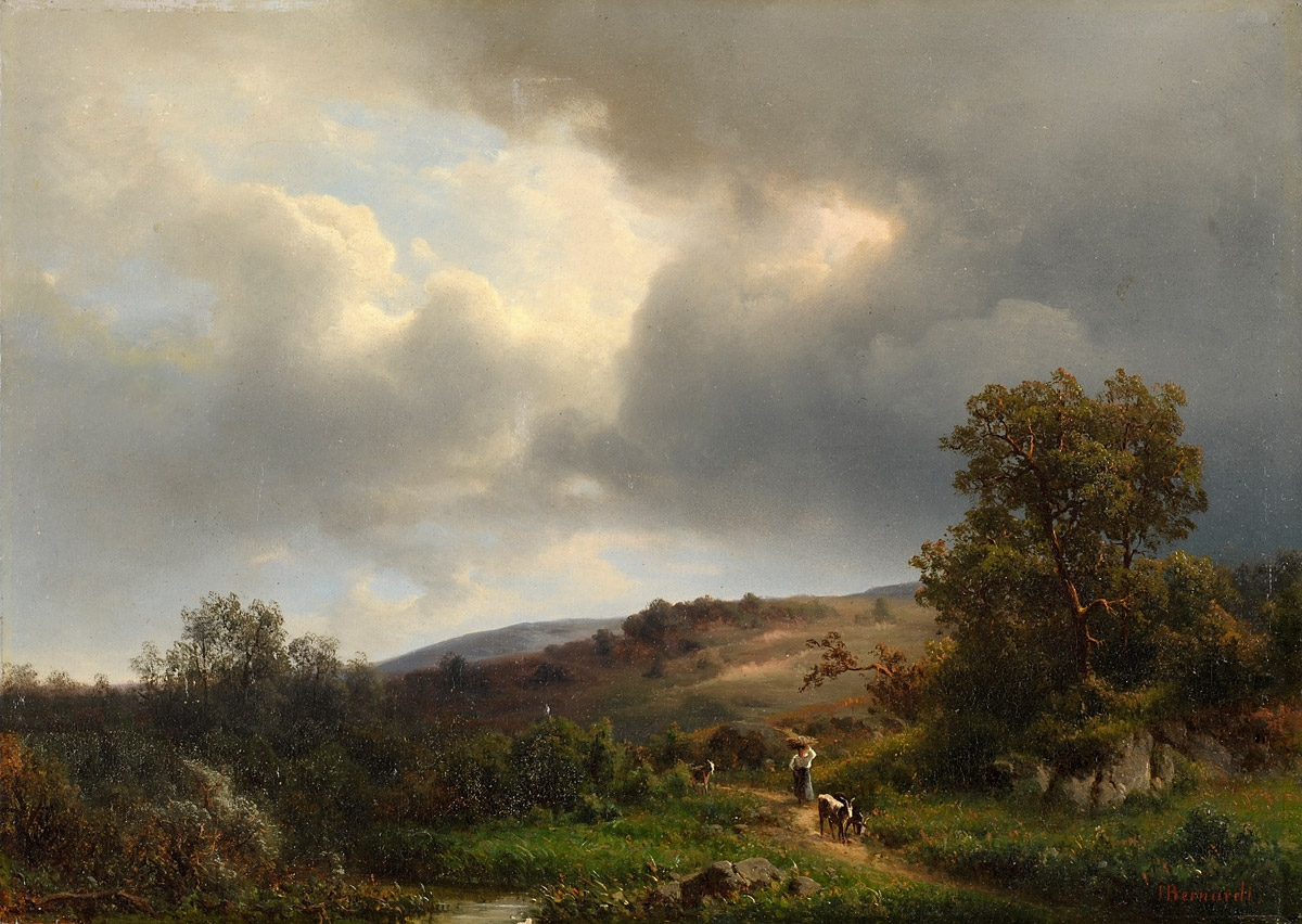 Eifellandschaft. Signiert. Rückseite betitelt. Öl auf Leinwand, 48 x 66 cm